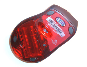 Optische Maus (größere Version)